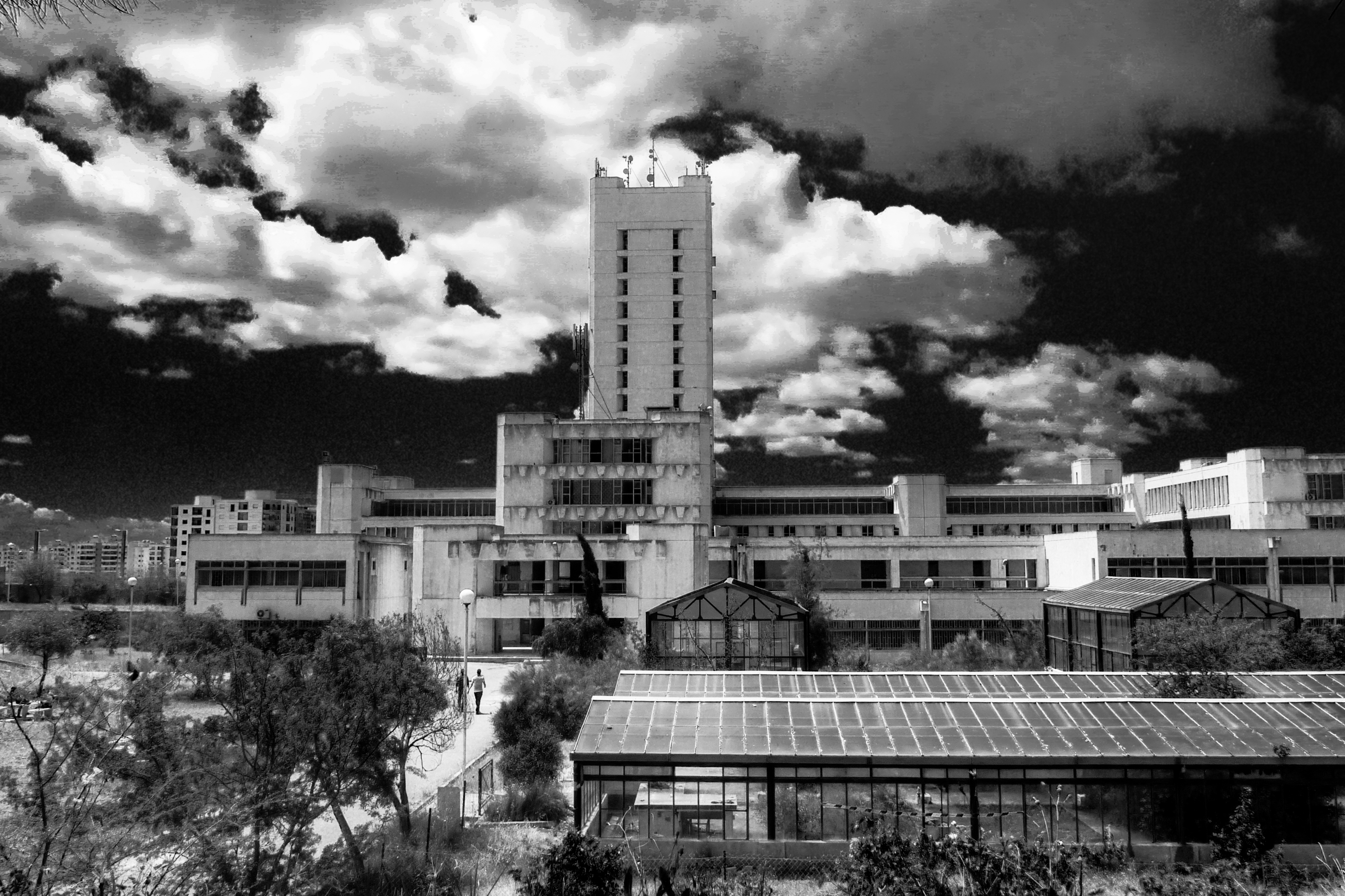 photo prise das l'univercité des sciences et de la technologie à ORAN USTO